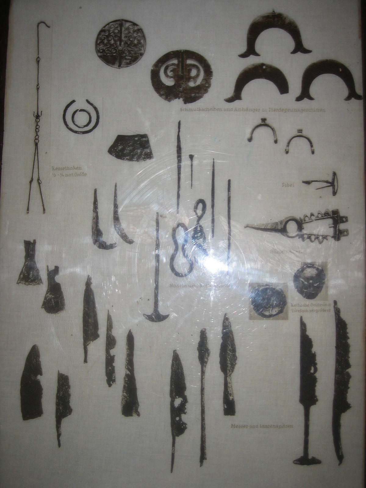 Fundstücke der Altenburg bei Niedenstein, abfotografiert von einer öffentlichen Tafel